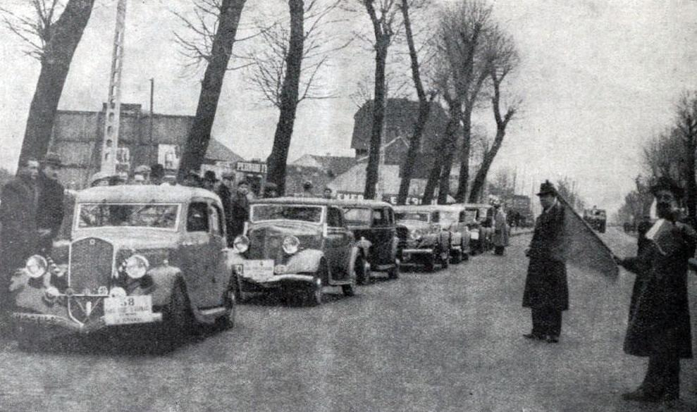 Rallye Paris-Saint-Raphael féminin 1935, départ d'Orly en février.